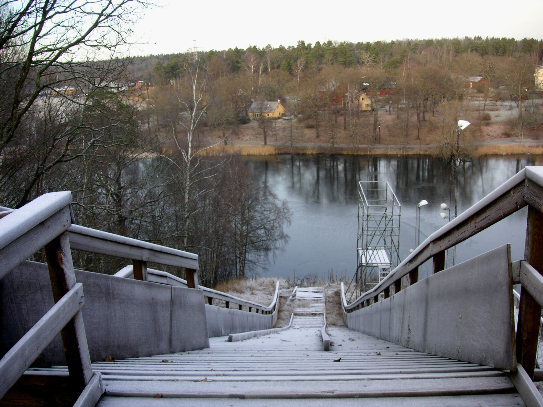 Hoppbacken "självmördaren" Fiskartorp på Norra Djurgården i Stockholm. K25 (?). Skisprungschanzen-Archiv: Stockholm (Fiskartorpet)